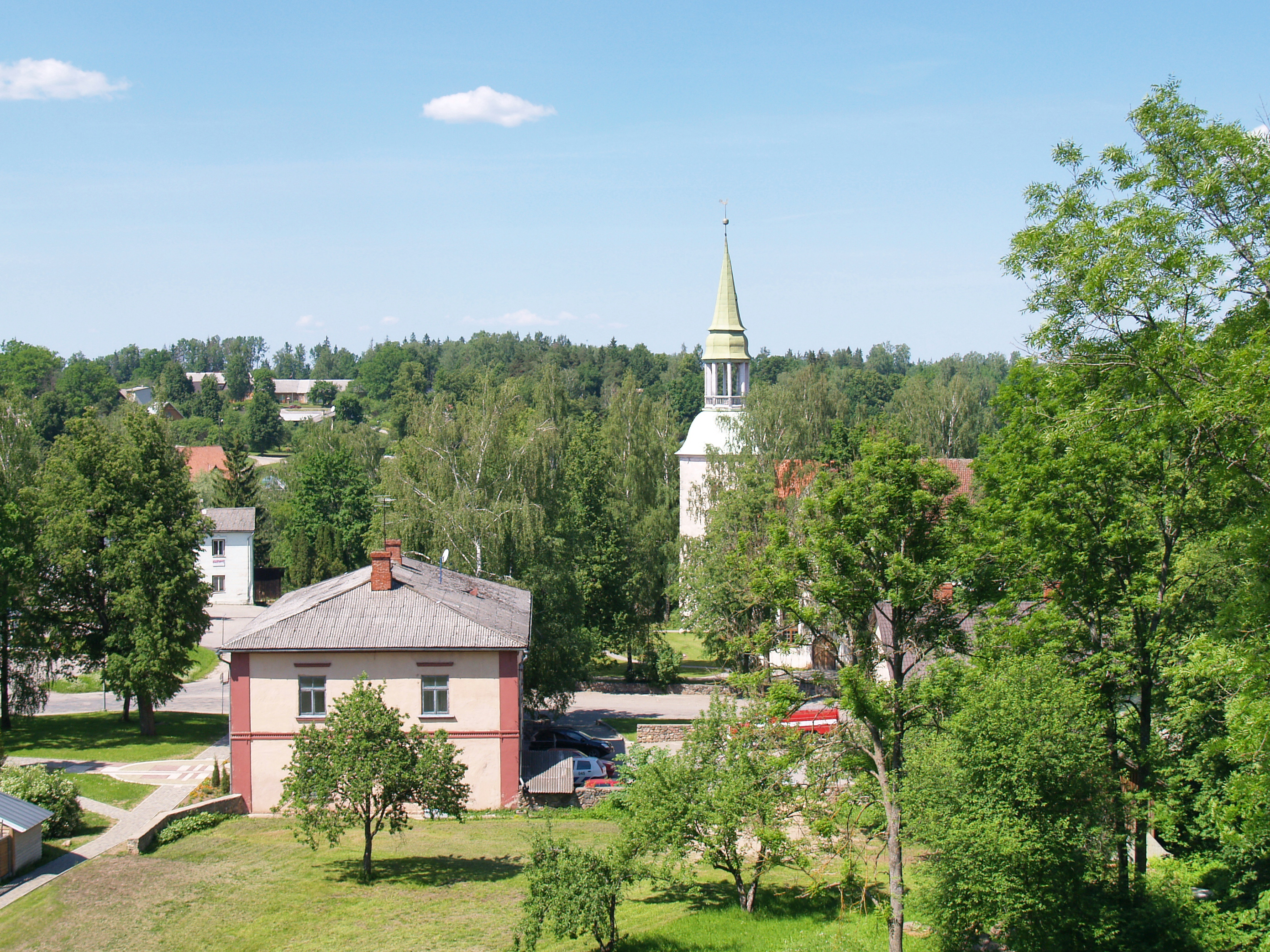 Rauna